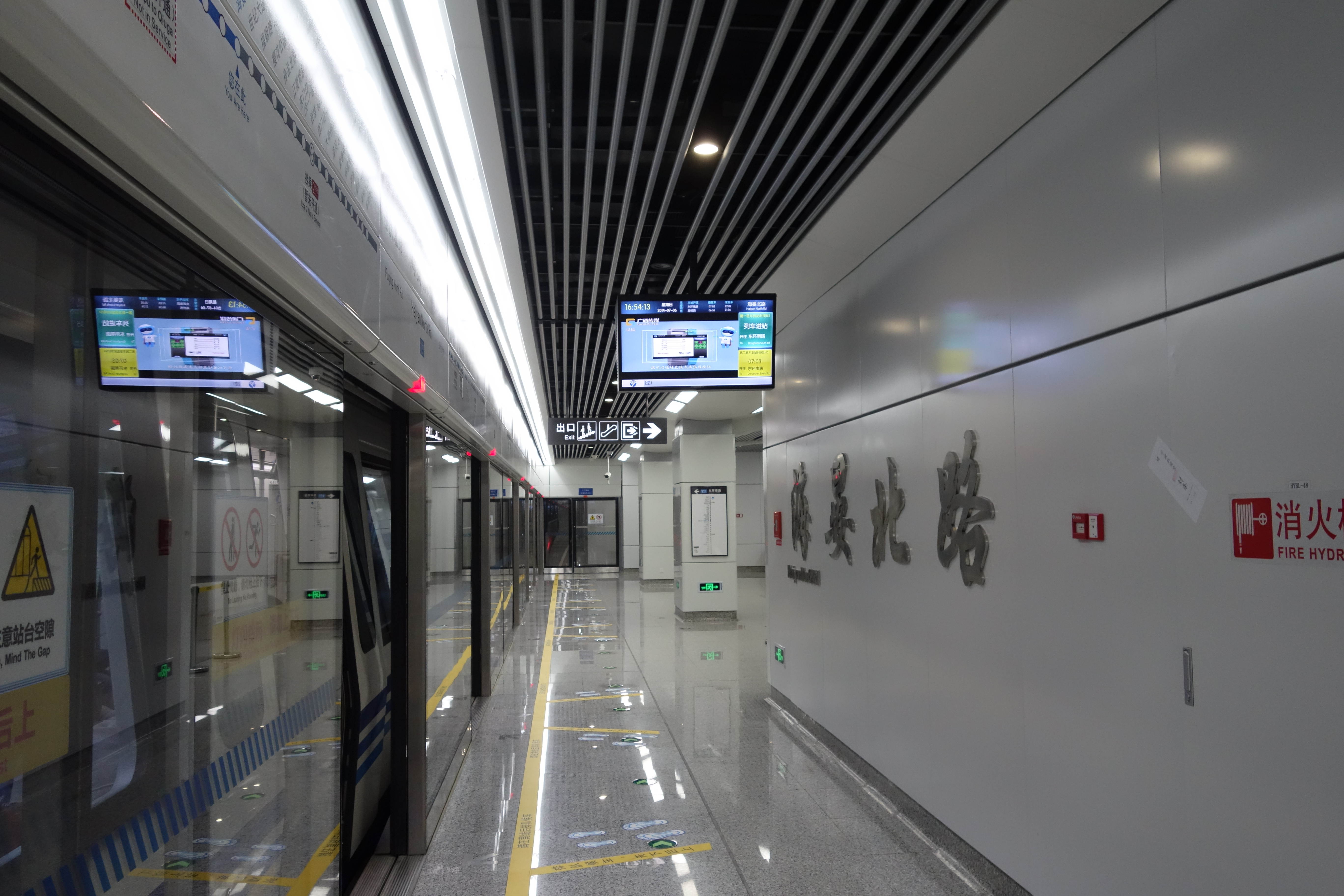 海晏北路站站台